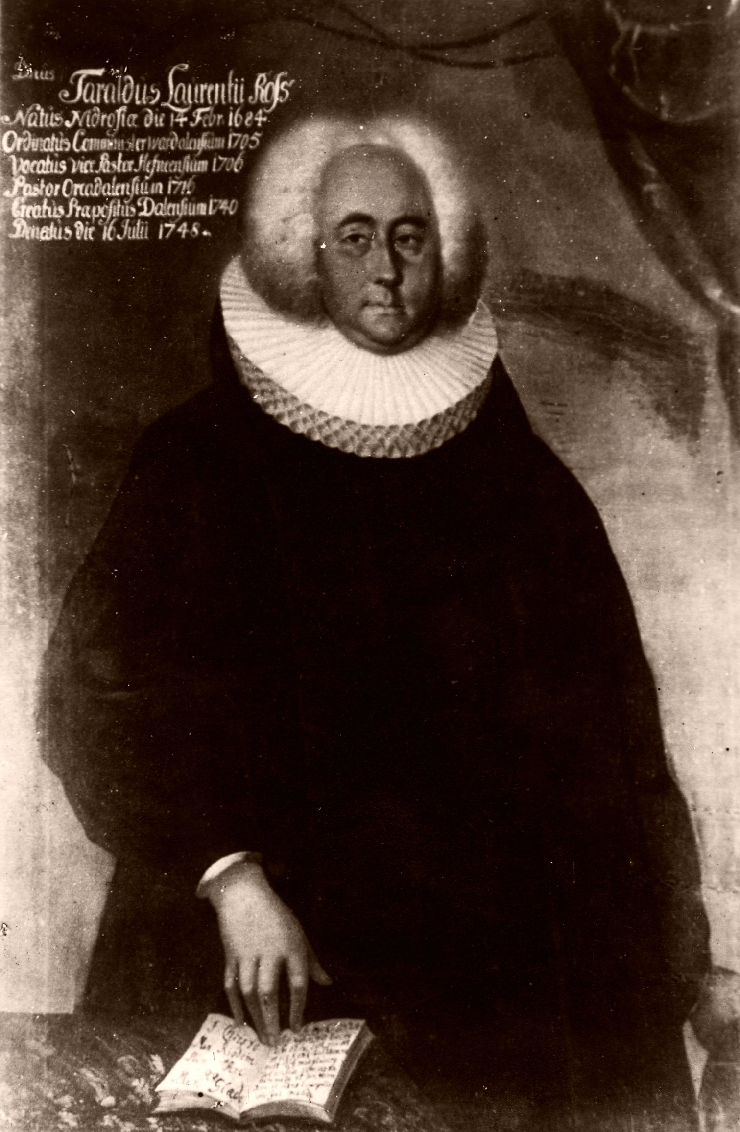 Format: Fotopositiv. Tarald Ross, f. 14. Februar 1684, d. 16 Juli 1748; g. m. Birgitte Sofie Sommerfeldt. Sønn av Nordlandshandler Lars Larsen Ross (d. 1719) i Trondhjem. Bror av Ole Ross (1712 - 1775). Prost i Orkdal, døde barnløs.